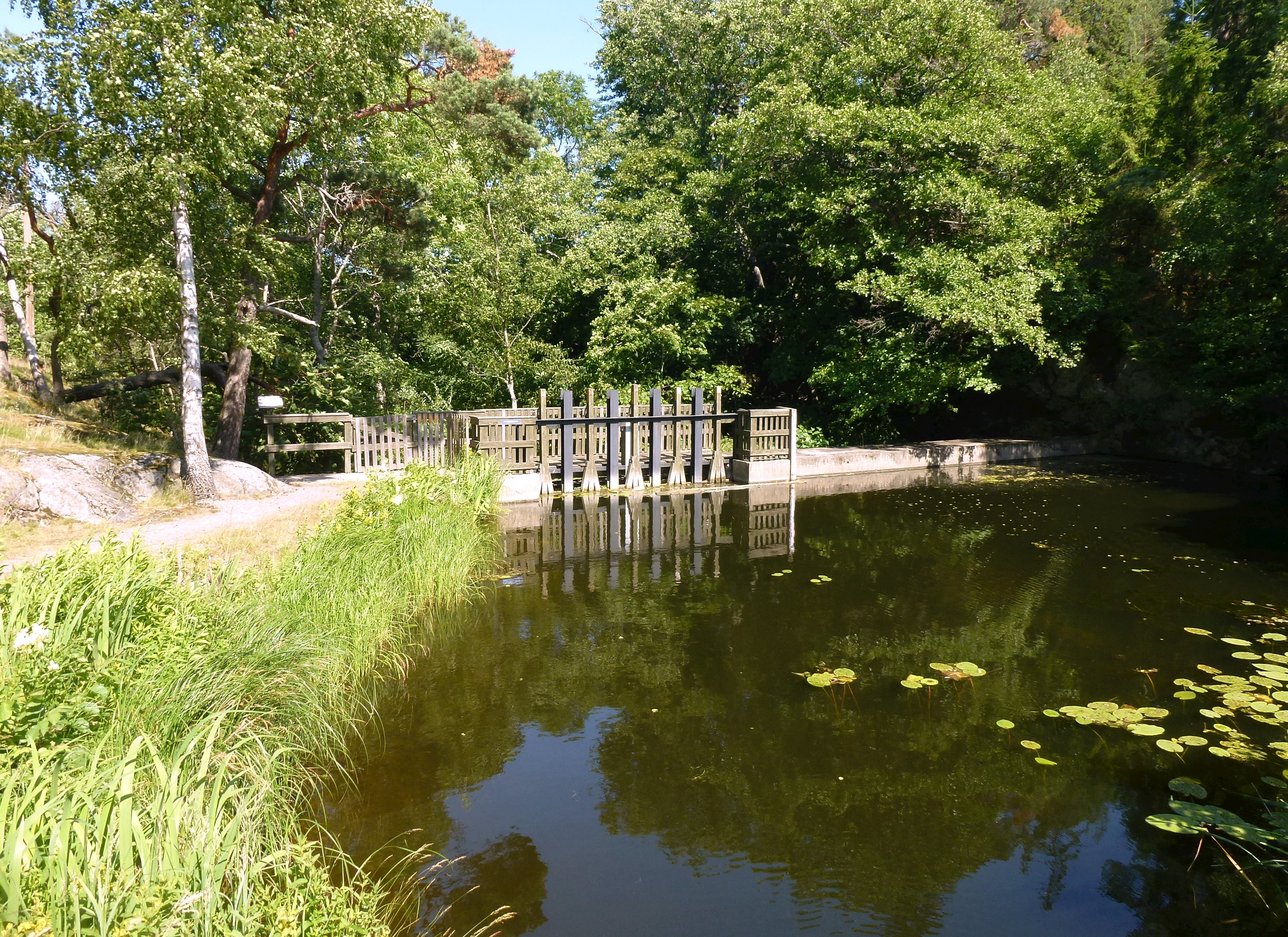 Follbrinkströmmens damm, som är den nordöstra delen av sjön Fatburen